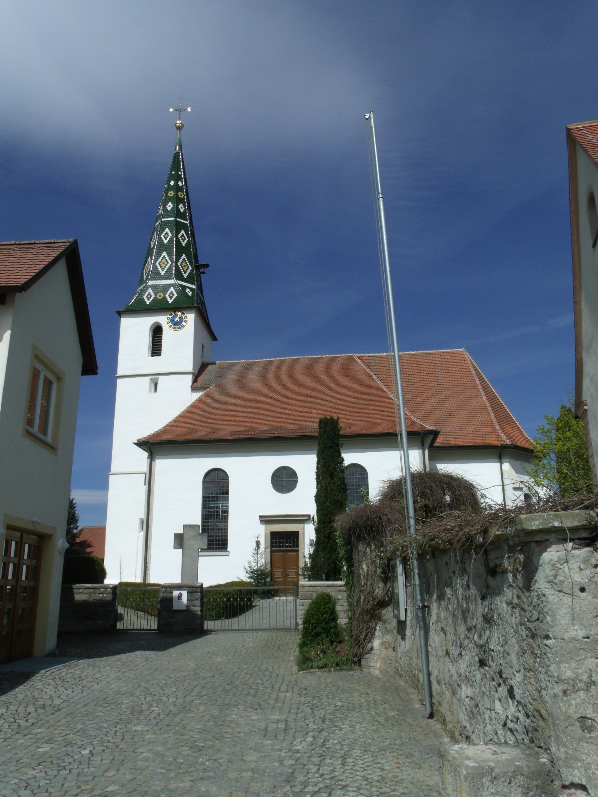 Weißenkirchberg, Ortsteil von Leutershausen im Landkreis Ansbach